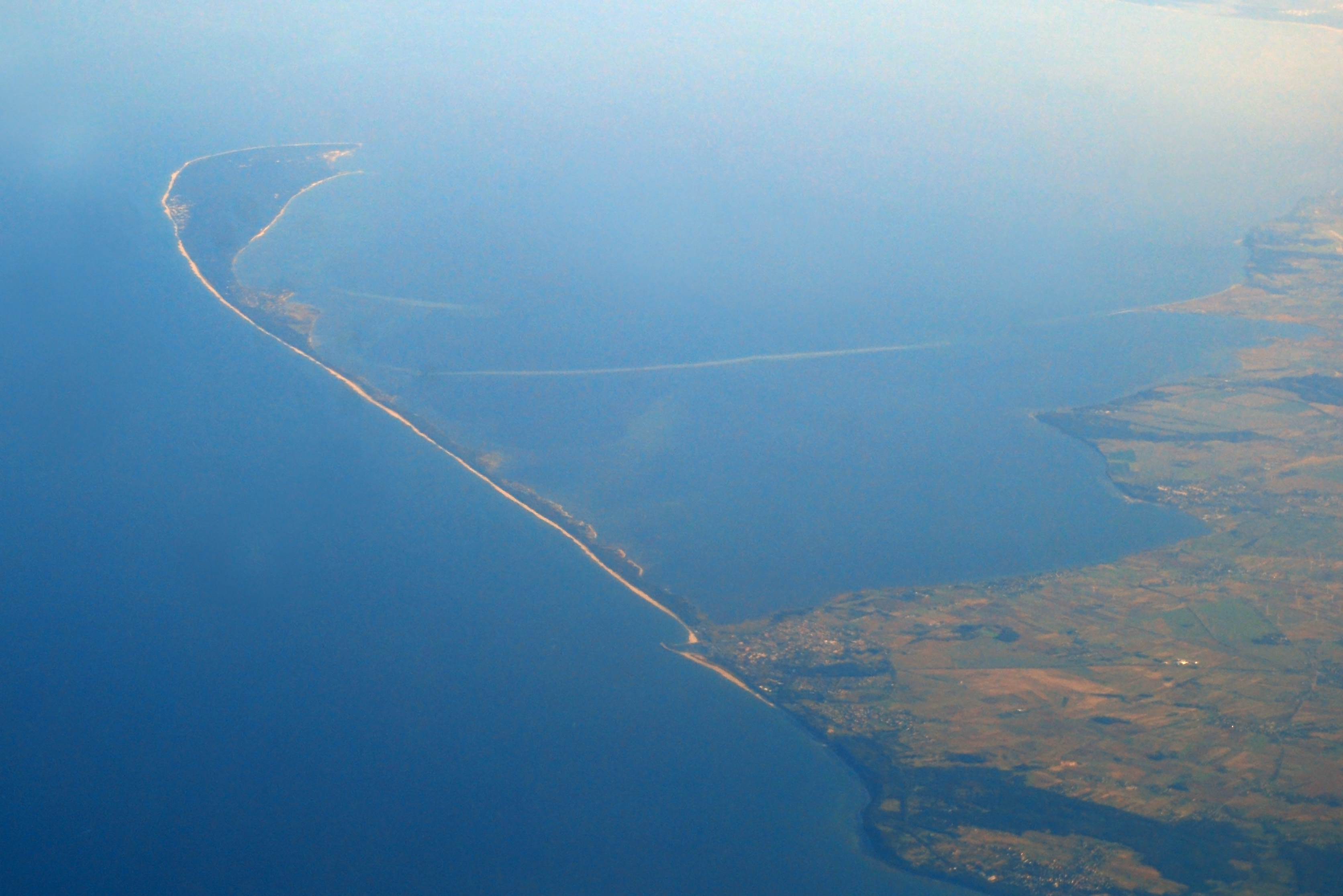 Blick über die Halbinsel Hel aus einem Verkehrsflugzeug